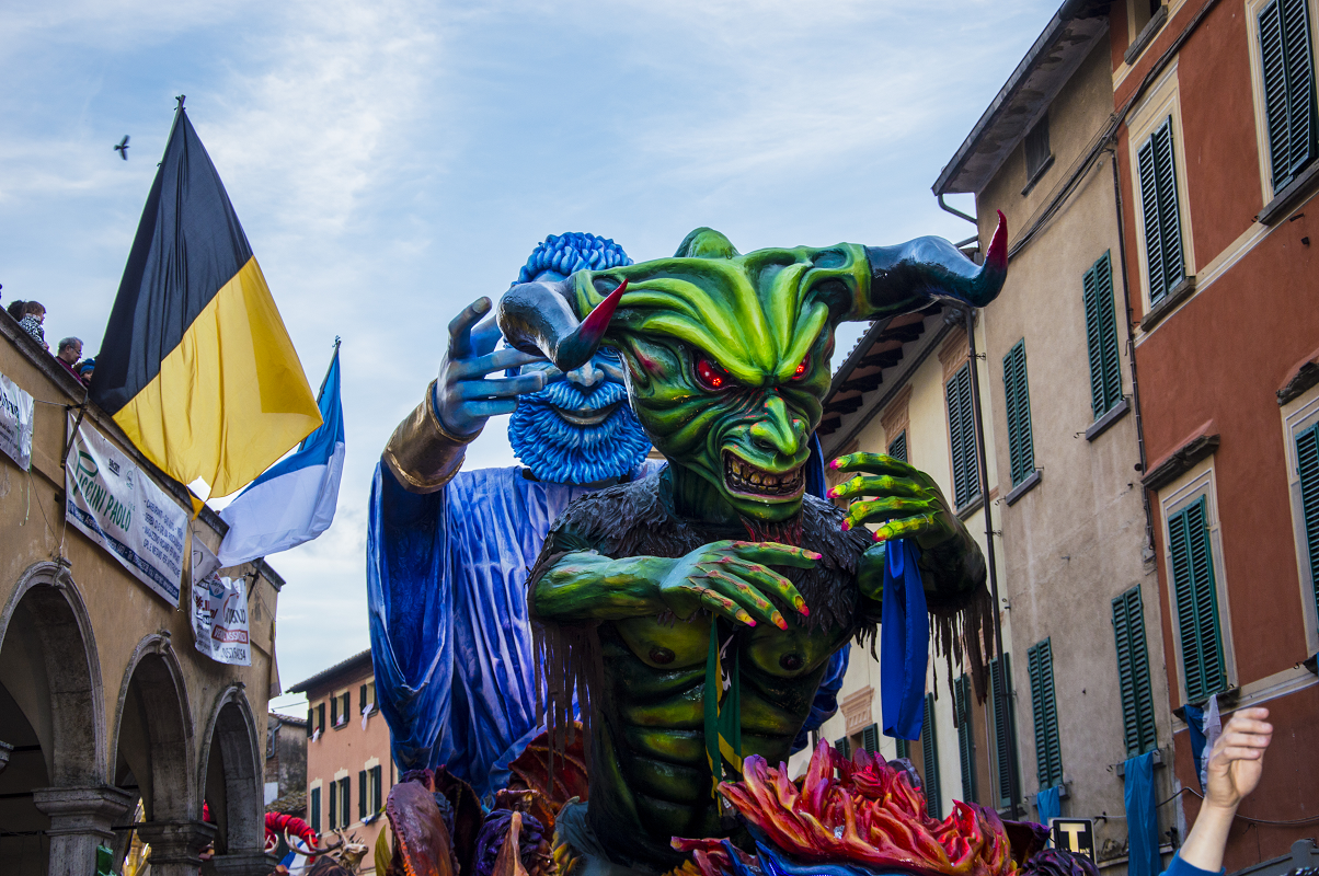 Carro del Cantiere Azzurri al Carnevale di Foiano della Chiana 2015